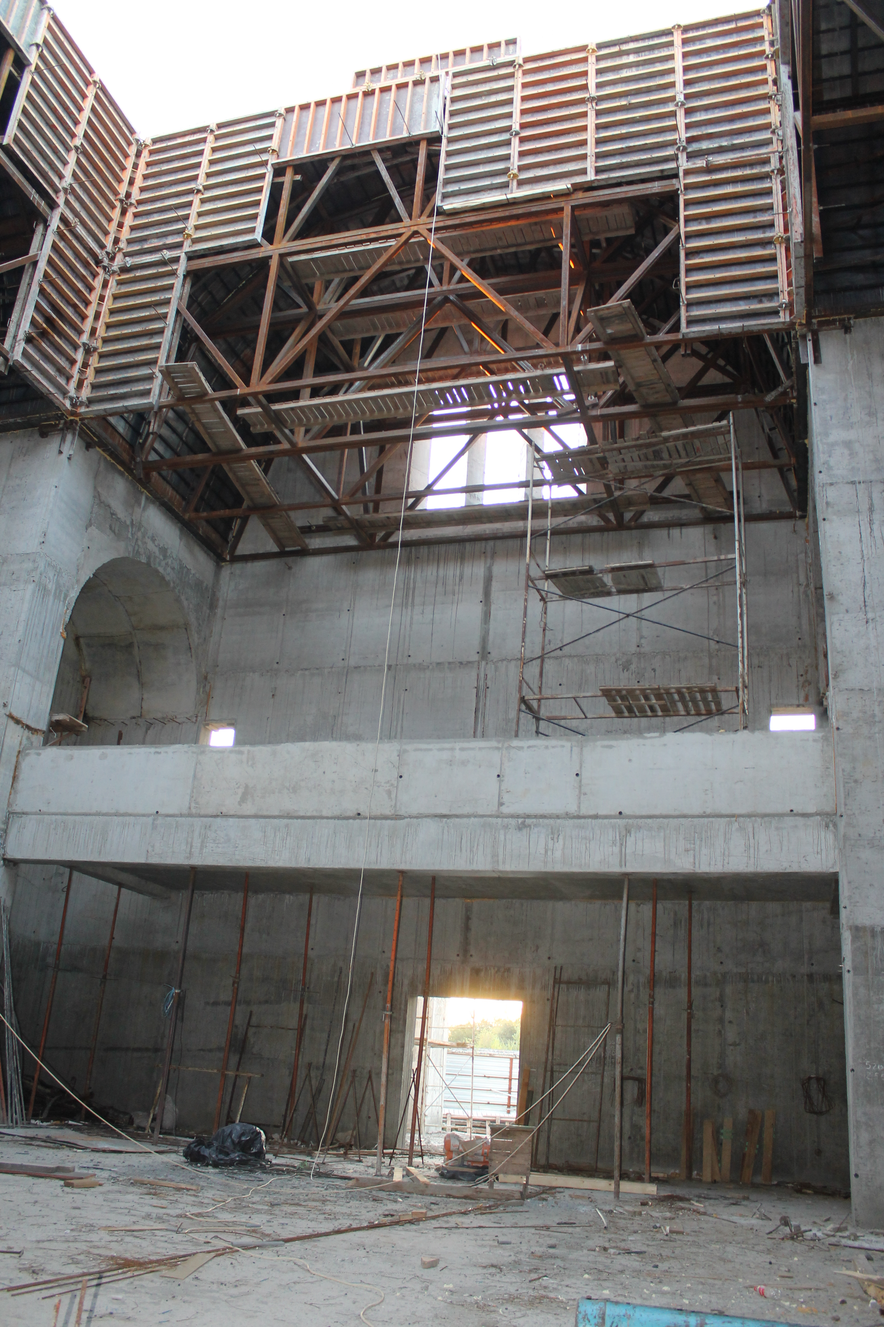 Строительство храма, октябрь 2014 г.